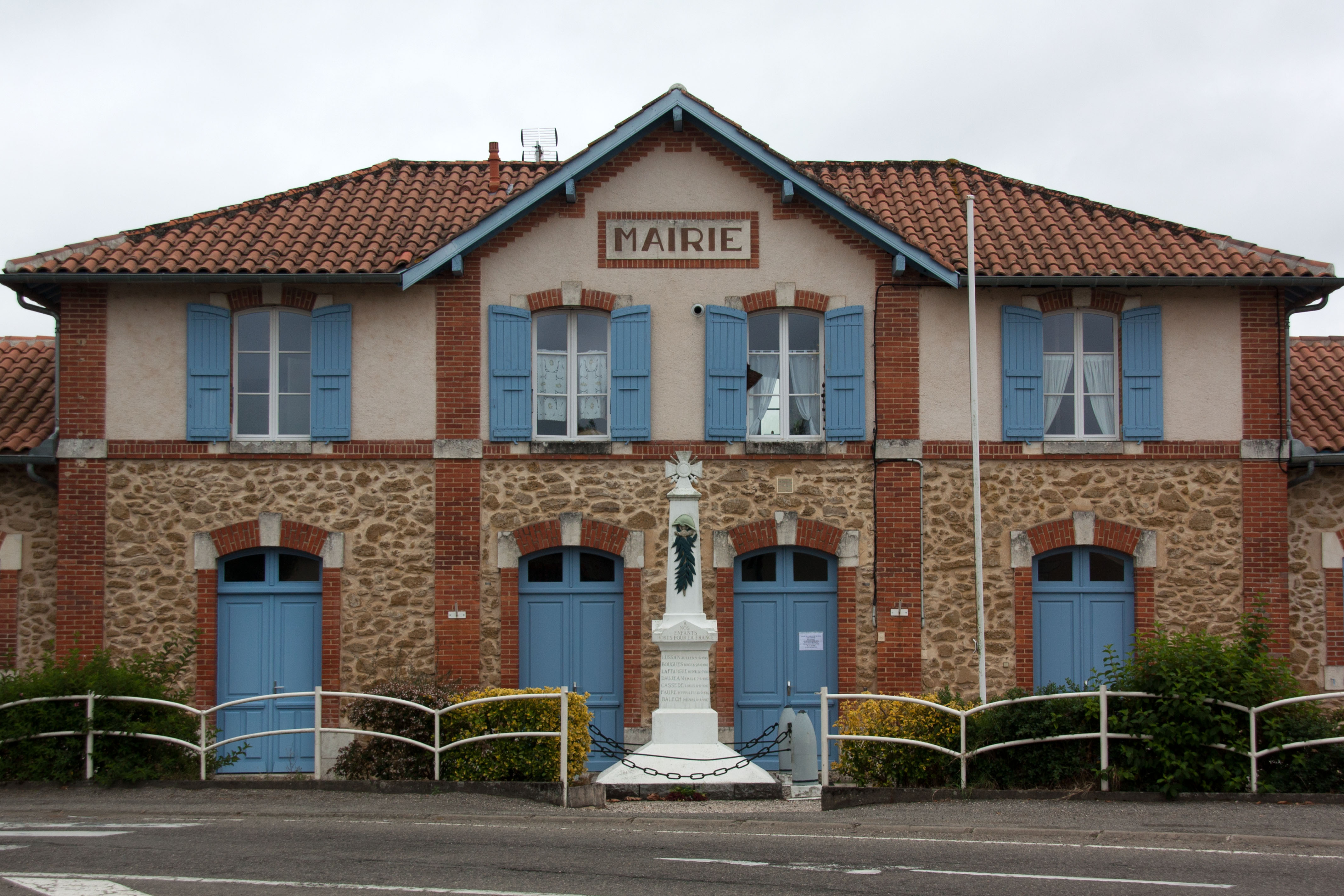 Mairie de Tillac, Gers, France